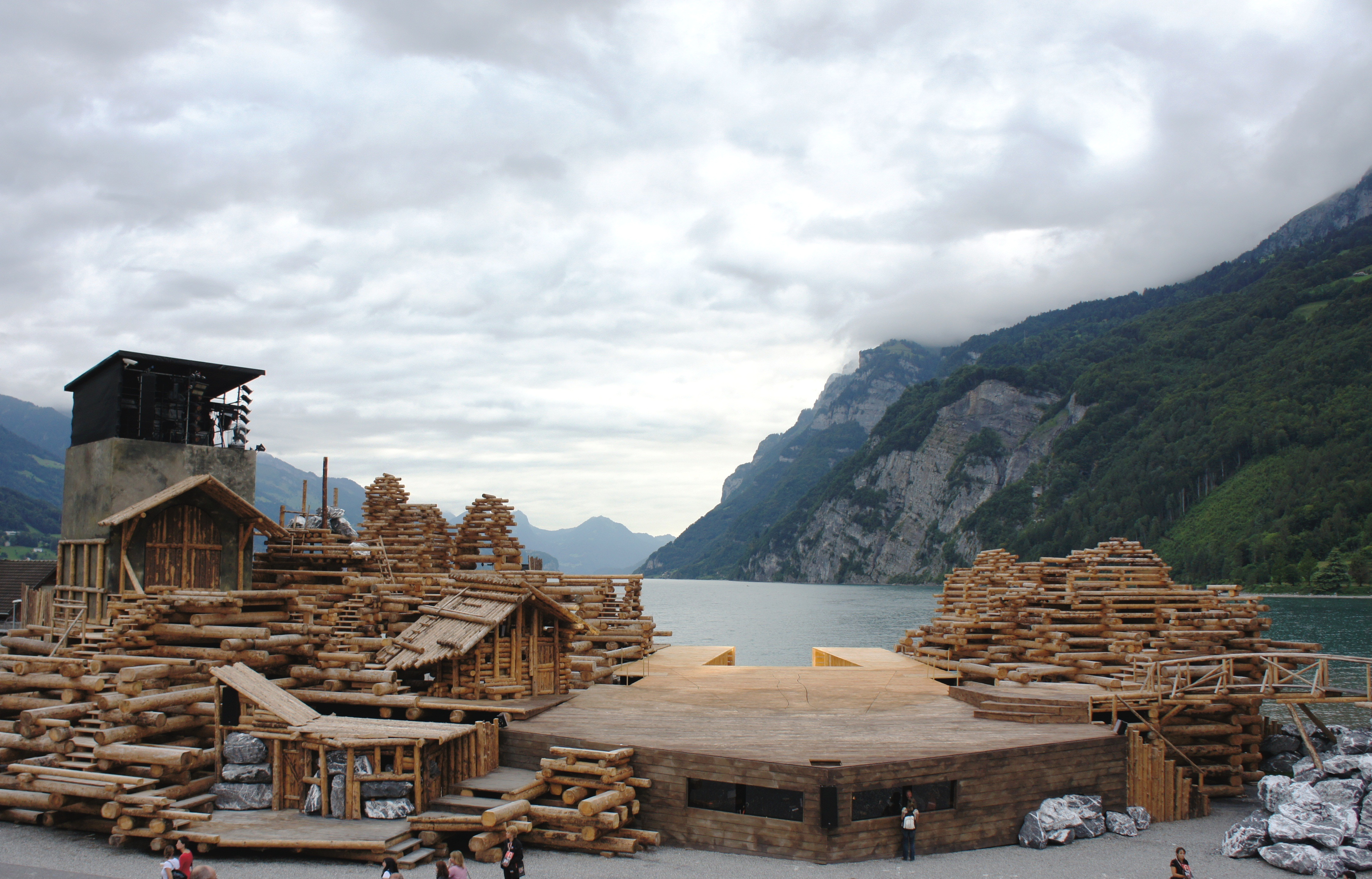 Die Walensee-Bühne (mittlerer Teil) für Tell - Das Musical vor der Aufführung.